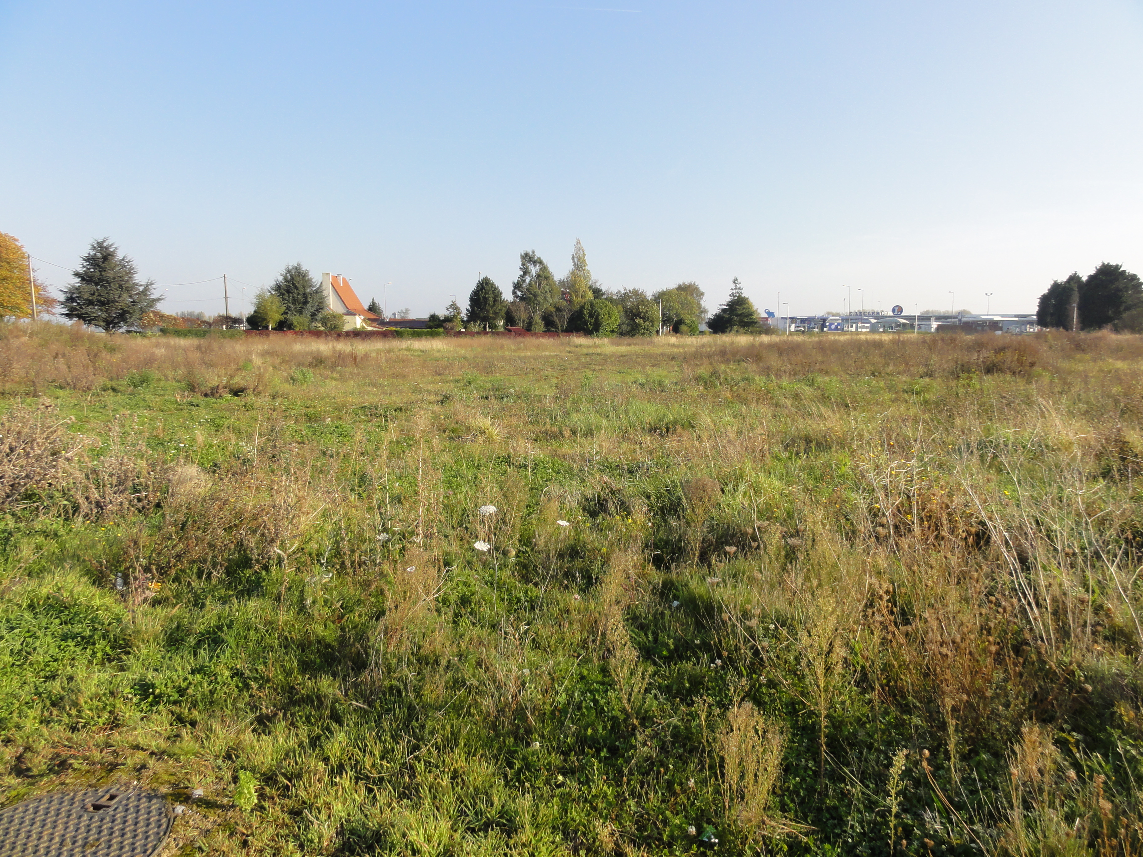 Terril n° 221 dit 12 d'Oignies, disparu, Fosse n° 2 de la Compagnie des mines de Carvin, Carvin, Pas-de-Calais, Nord-Pas-de-Calais, France.